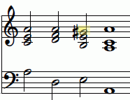 harmonic minor cadence with highlighted leading-tone